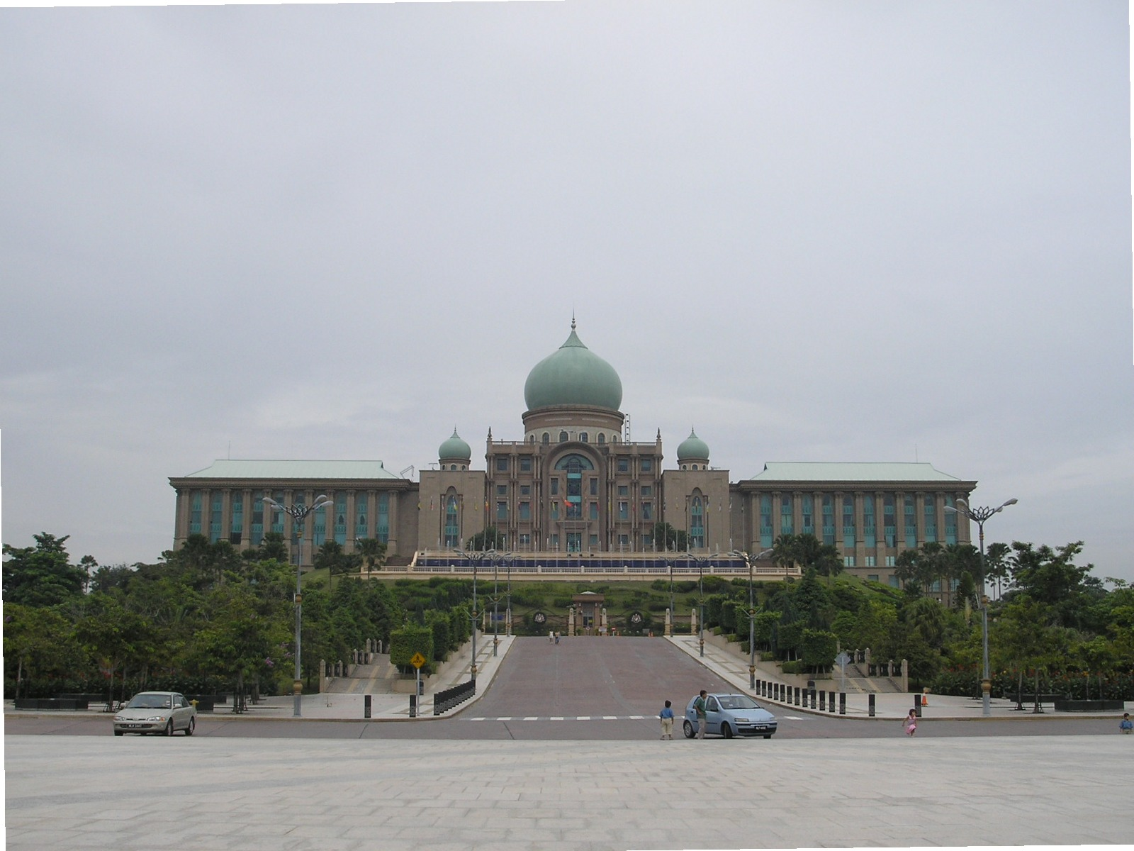 The Perdana Putra in Putrajaya.